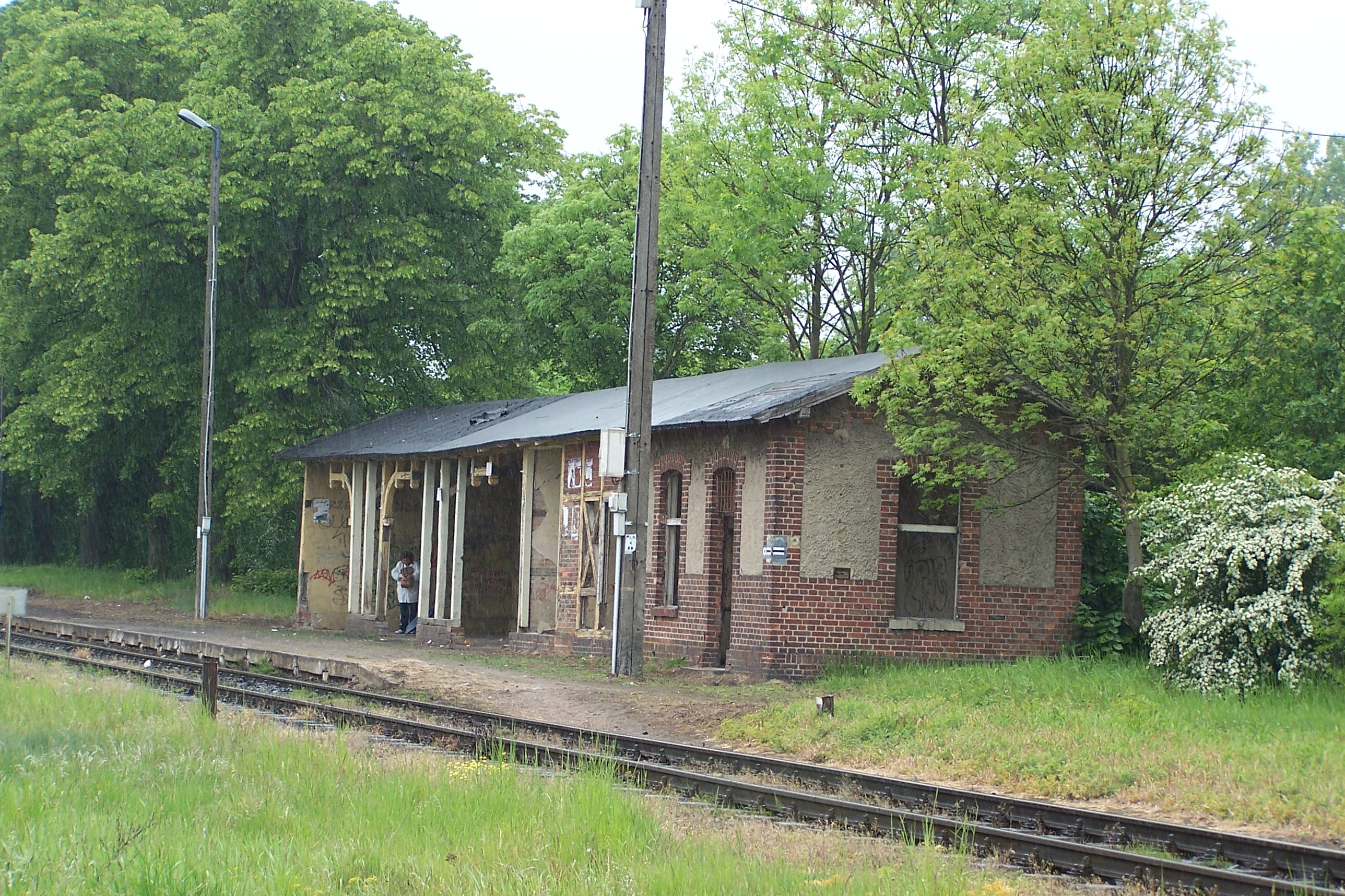 Przystanek kolejowy Trzebaw Rosnówko